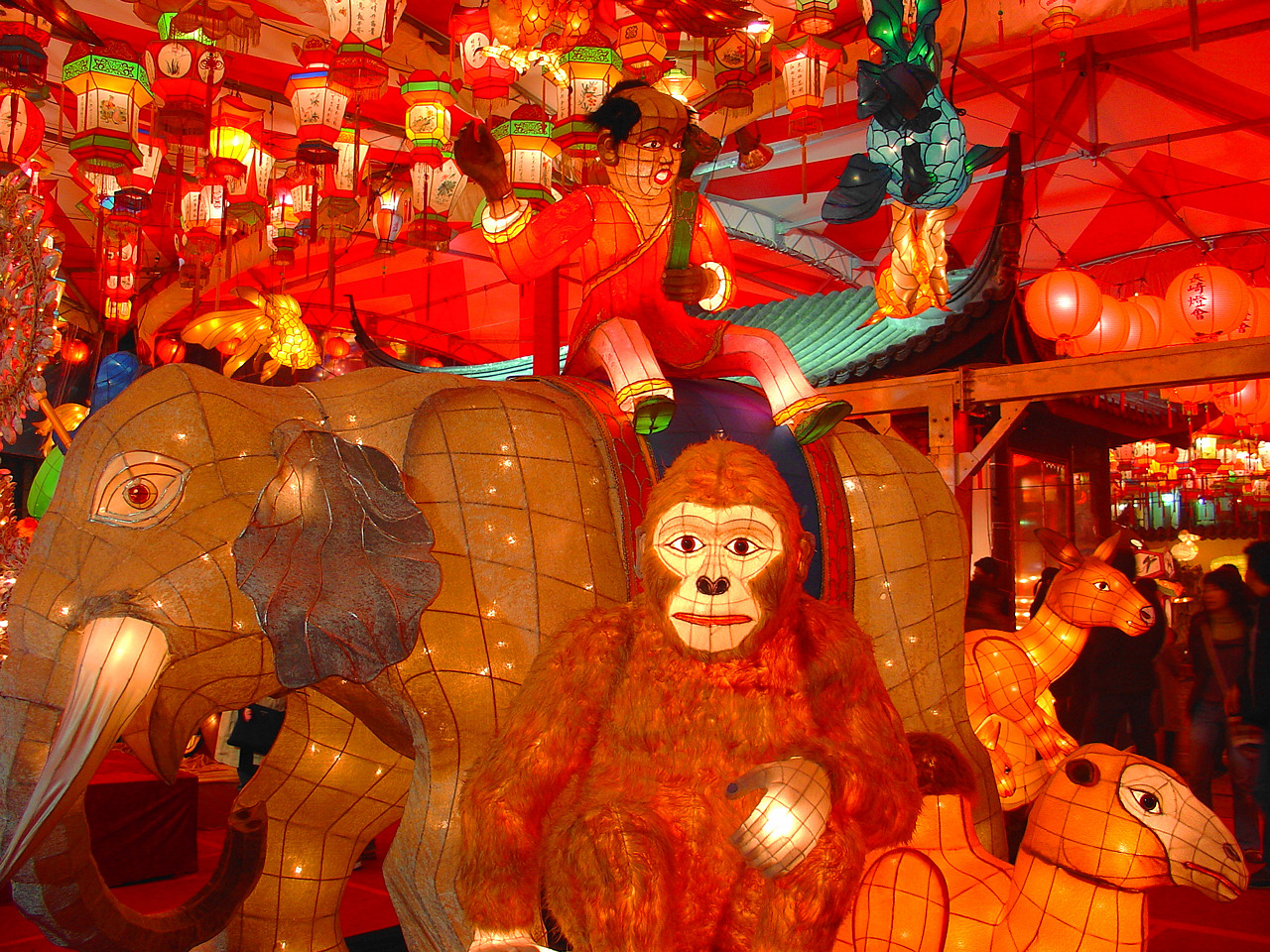 Nagasaki Lantern Festival.(Nagasaki City, Nagasaki Prefecture, Japan)